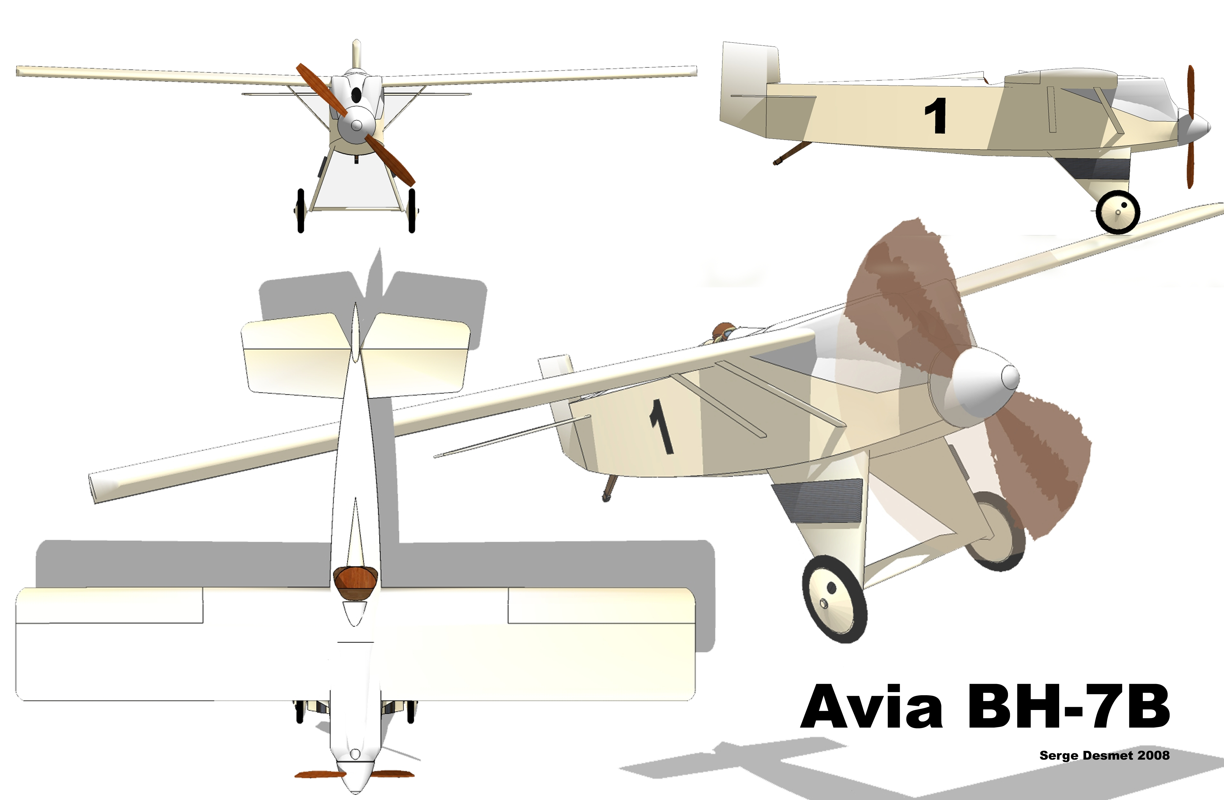 Plan 3 vues de l'Avia BH-7B